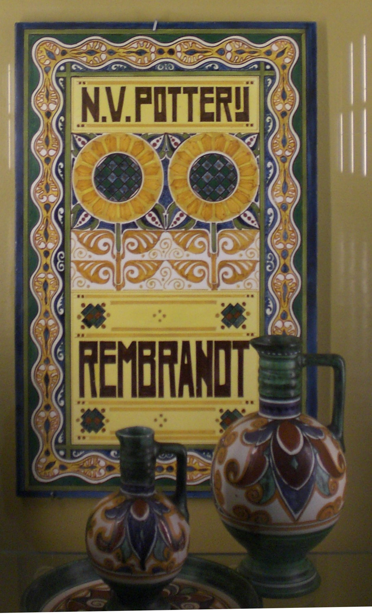 Ceramics of Potterij Rembrandt, Museum Het Valkhof, Nijmegen